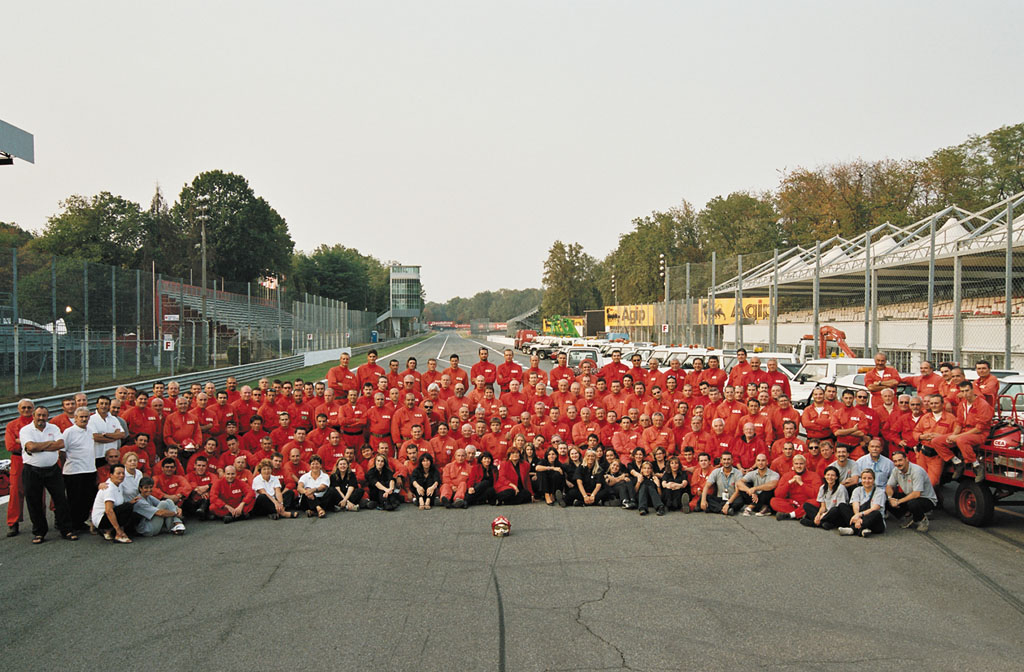 Foto di gruppo CEA Squadra Corse in occasione del 30° anniverario